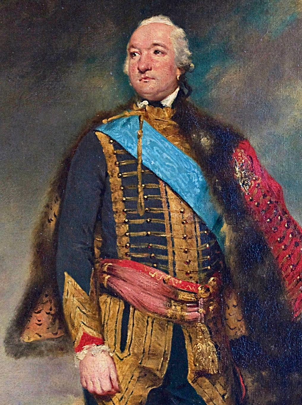 Louis-Philippe Herzog von Chartres, später von Orléans (1747–1793), in Husarenuniform.